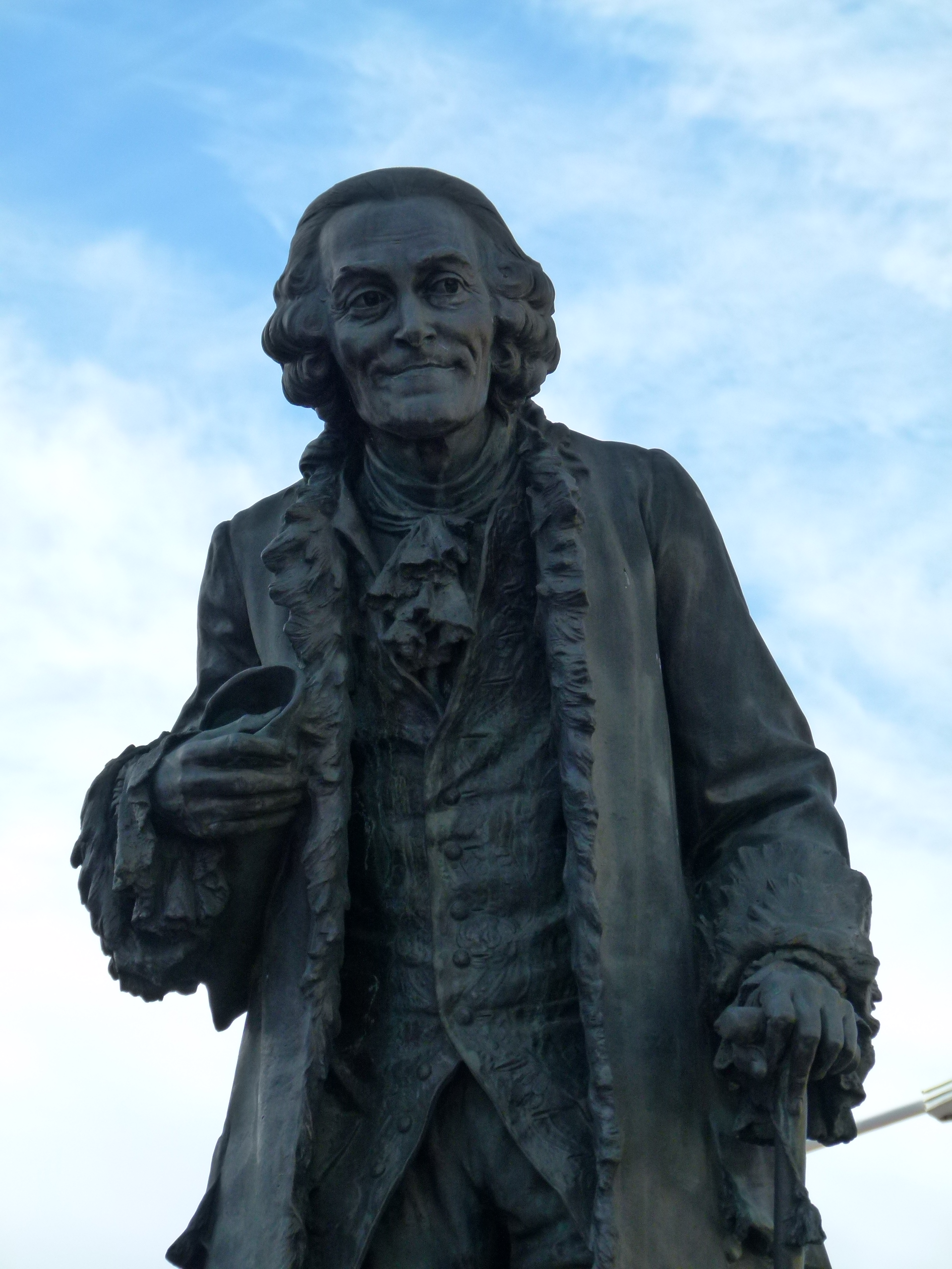 Statue von Voltaire in Ferney-Voltaire